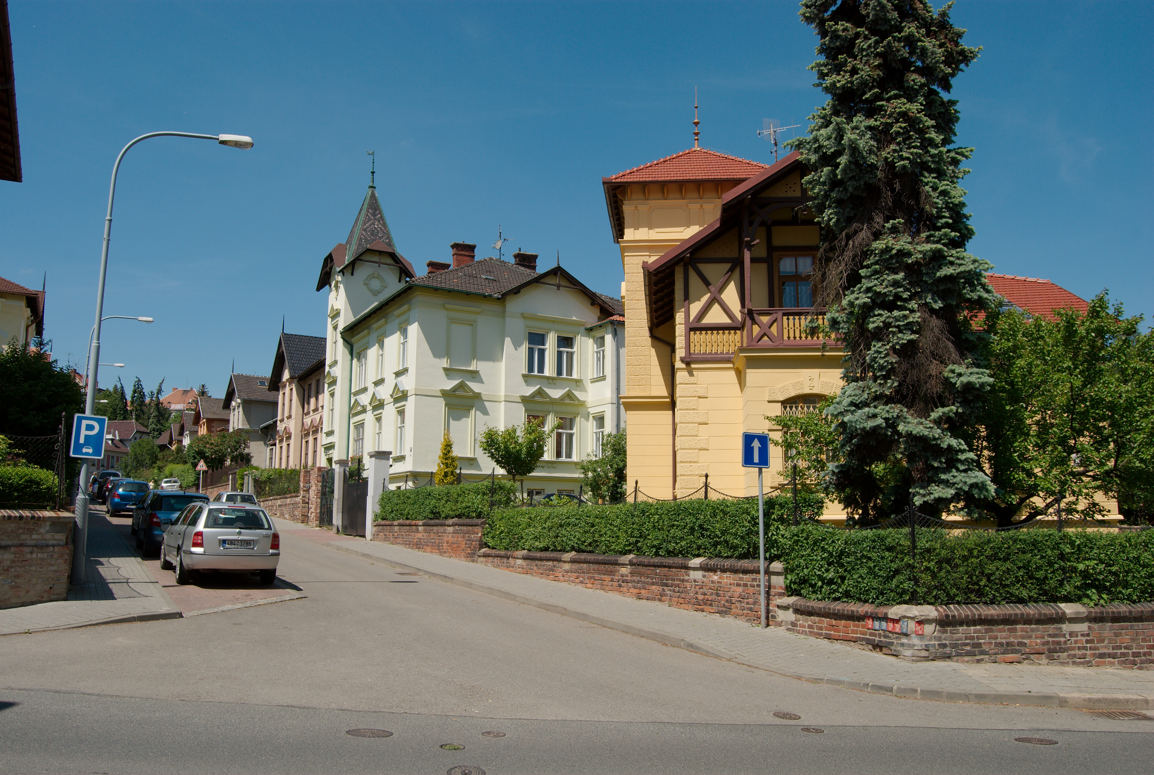 Corsu: Brno-Masarykova čtvrť - původní německé domy na severní straně Všetičkovy ulice (pohled od východu)